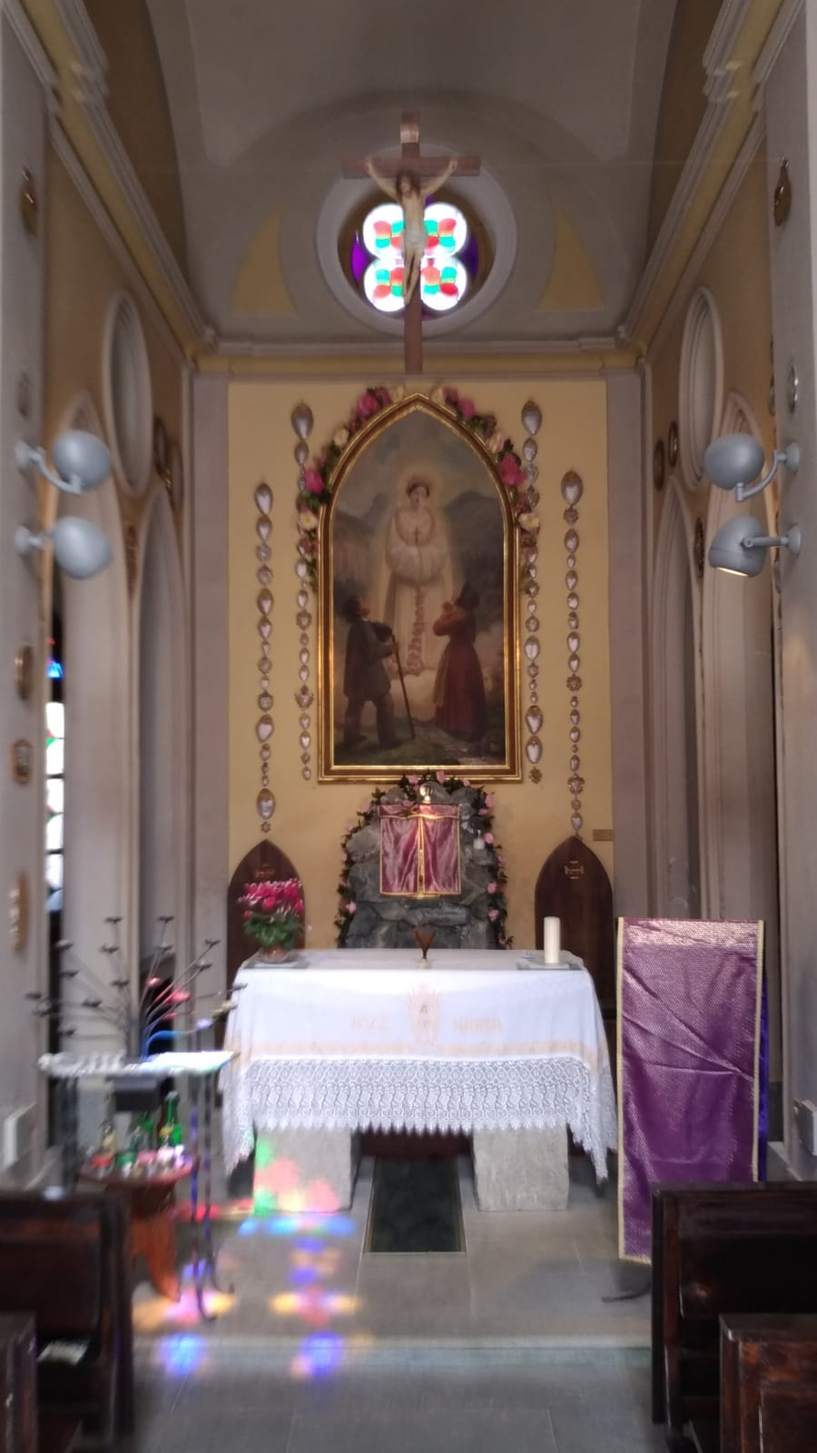 Foto del grande quadro dietro l'altare presso il santuario de "La Salette" a Viù.